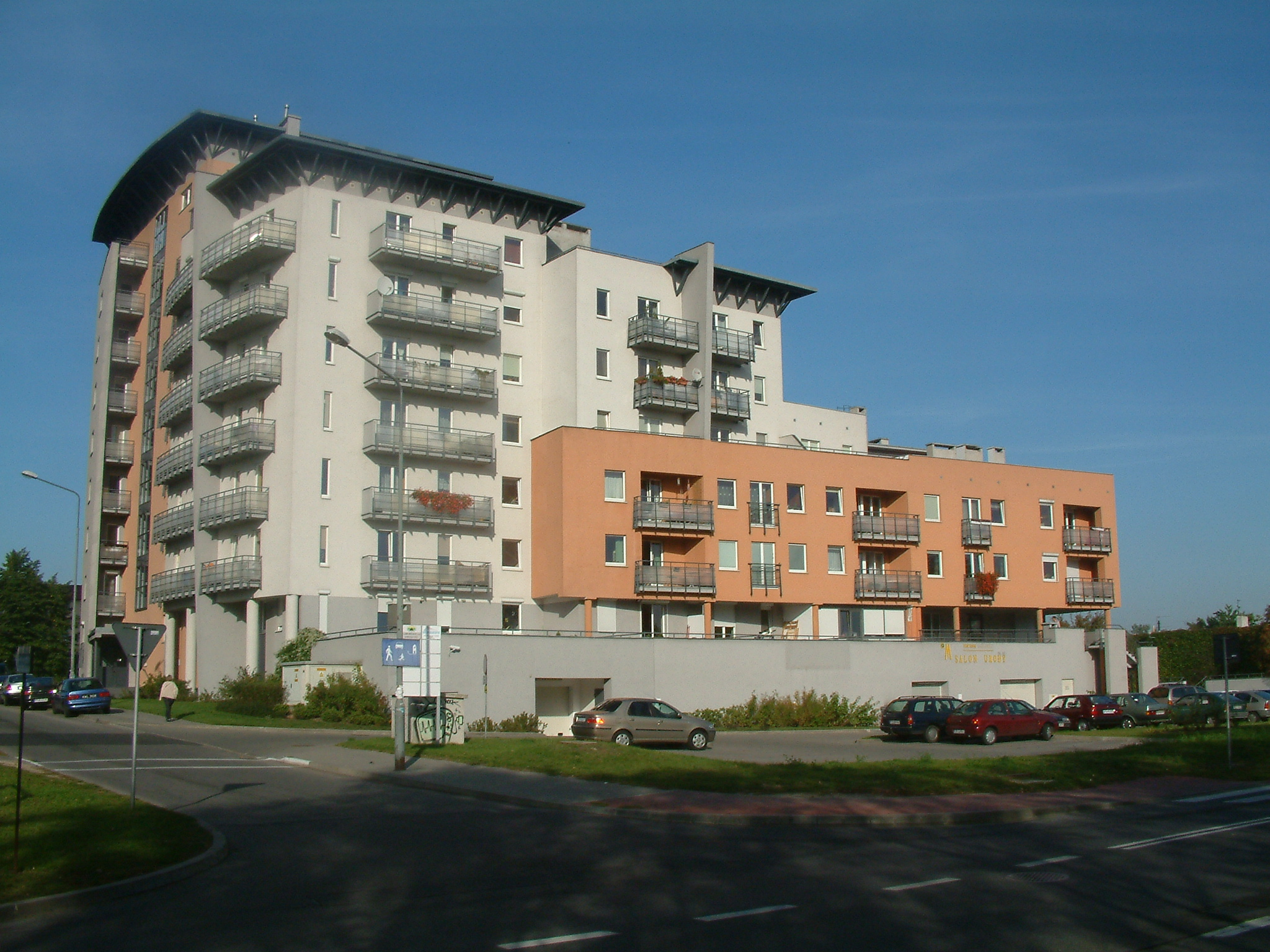 Osiedle Rusa / Zodiak, ul. Bliźniąt 14 Poznań